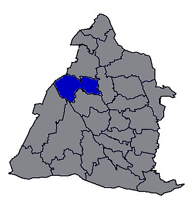 臺灣省彰化縣福興鄉。